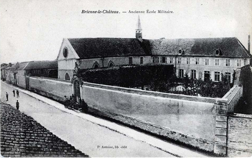 Brienne-le-Château l'école militaire